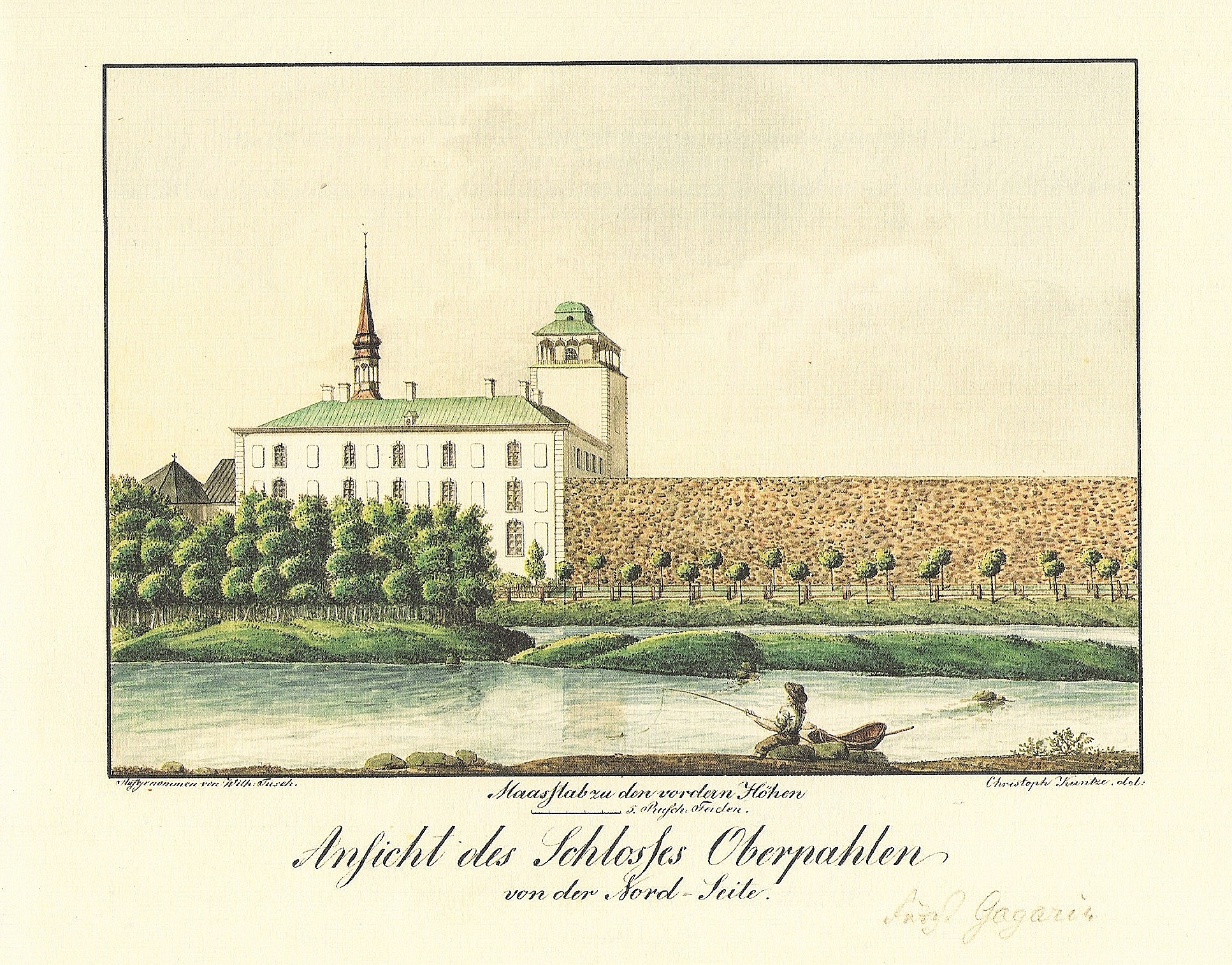 Põltsamaa linnus ja loss. Paulucci album